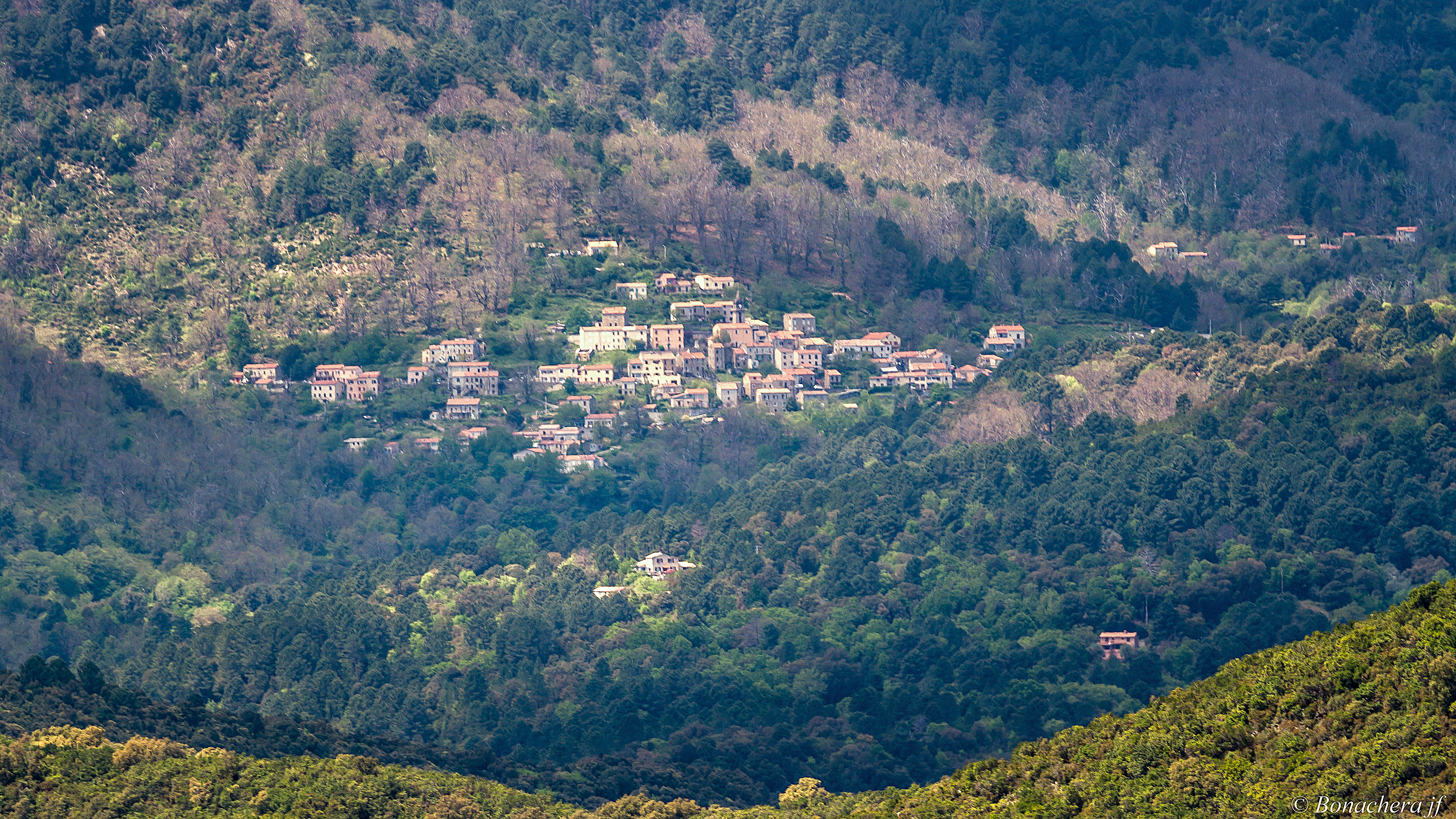 Corsu: San Gavinu di Fiumorbu